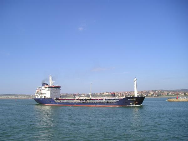 Itsasontzi bat Bilboko itsasadar barrura sartzera doala.